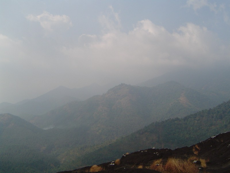 pottiyapara